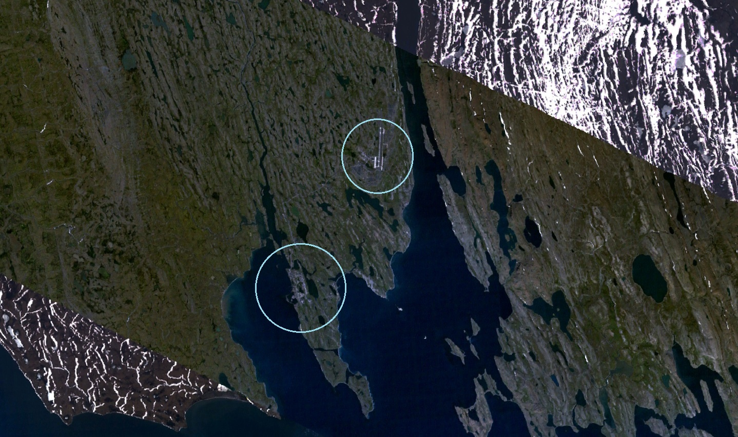 Посёлок Белушья Губа и посёлок Рогачёво с аэропортом Рогачёво (Амдерма 2) на полуострове Гусиная Земля острова Южный архипелага Новая Земля.